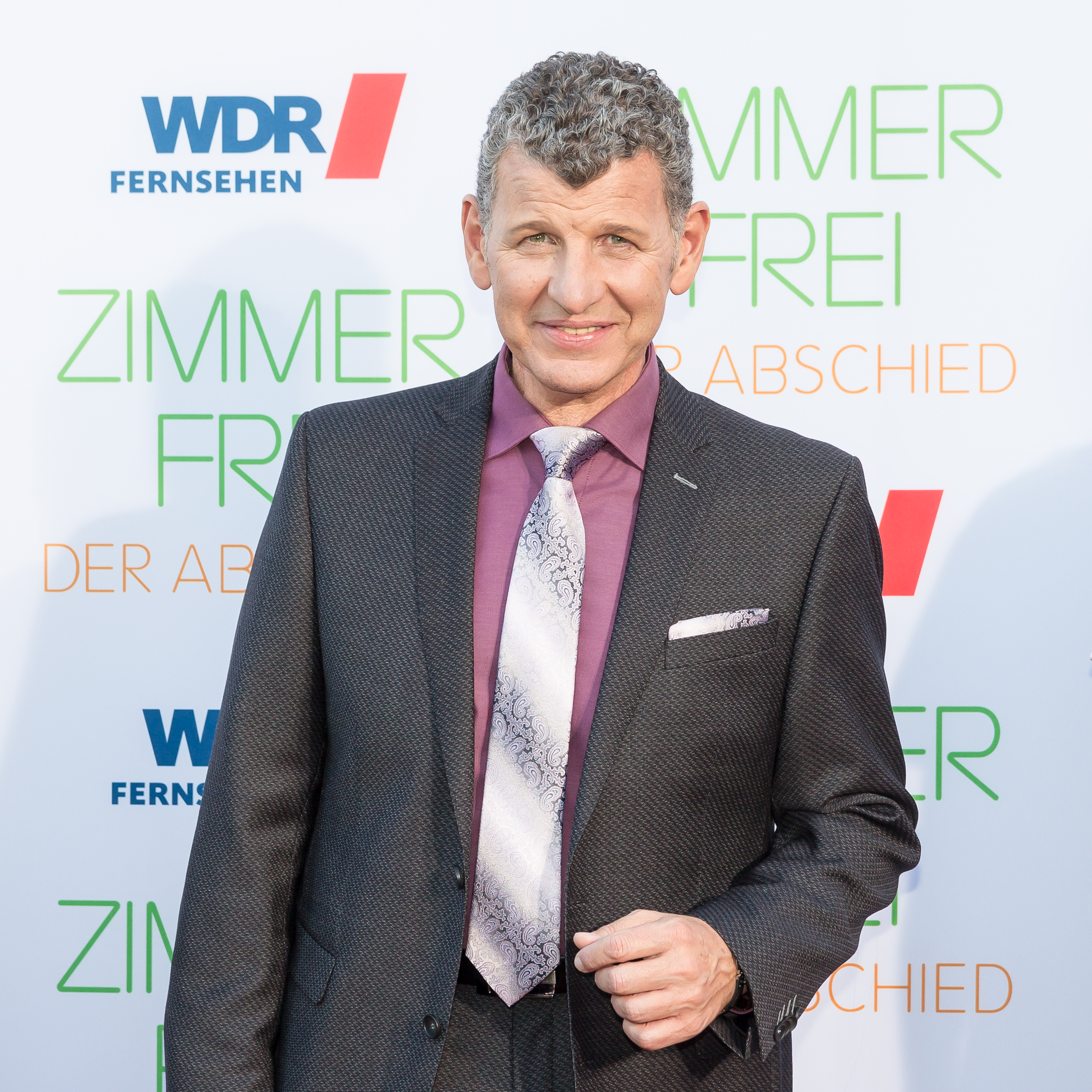 Zimmer frei - der Abschied Foto: Semino Rossi